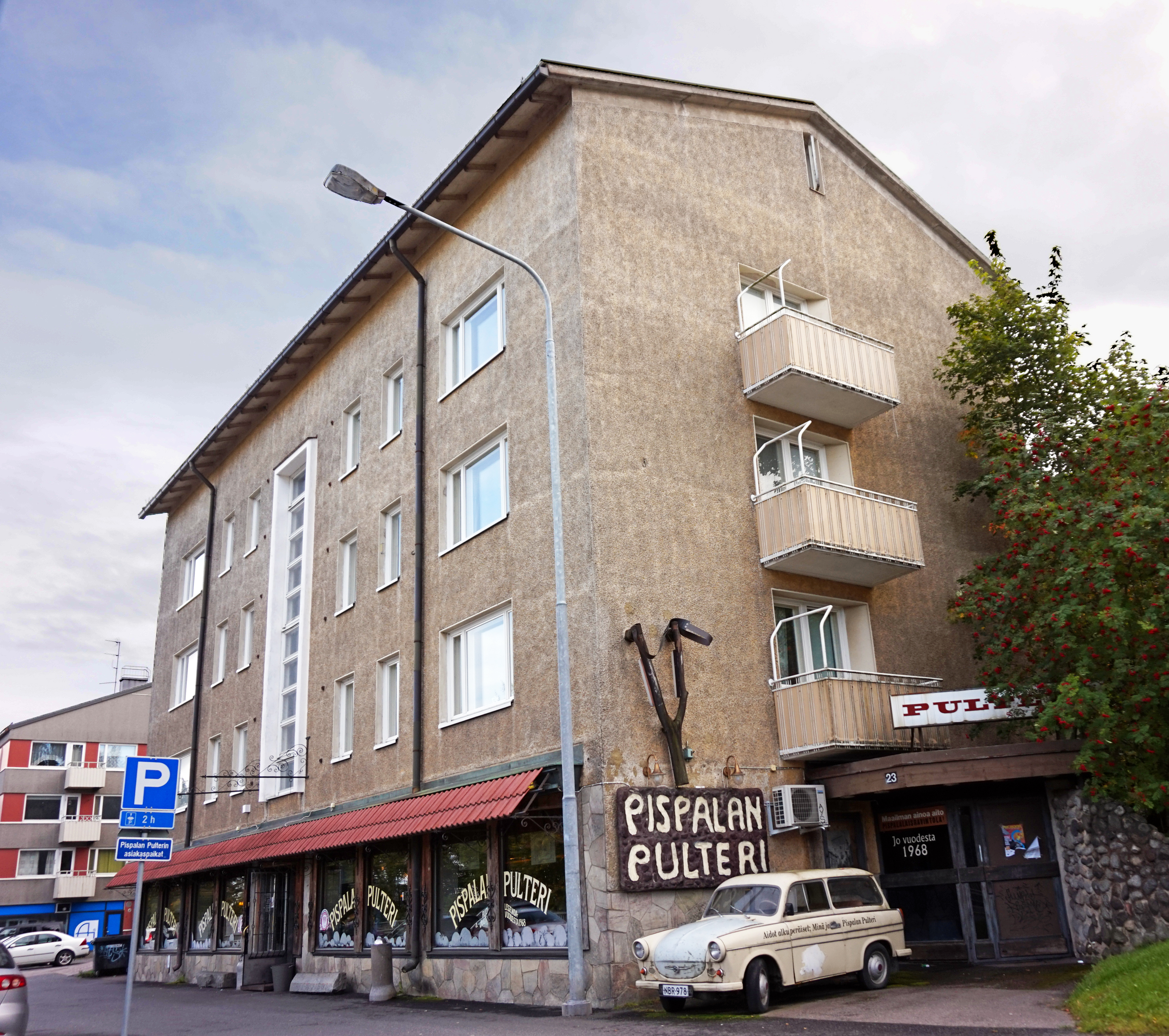 Pispalanrinne Tampereella: Pispalan Pulteri. This is a photo of a monument in Finland identified by the URL 1246